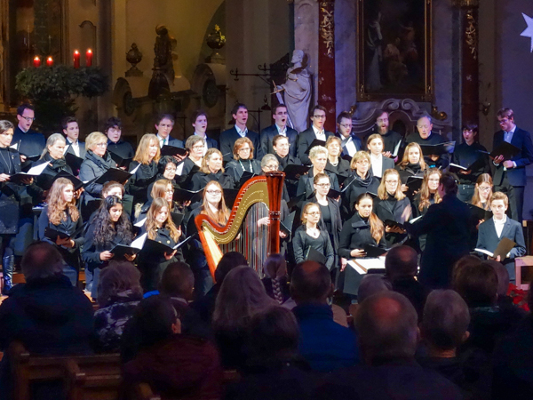 Der Stiftschor am Weihnachtskonzert 2016 in der Klosterkirche Engelberg